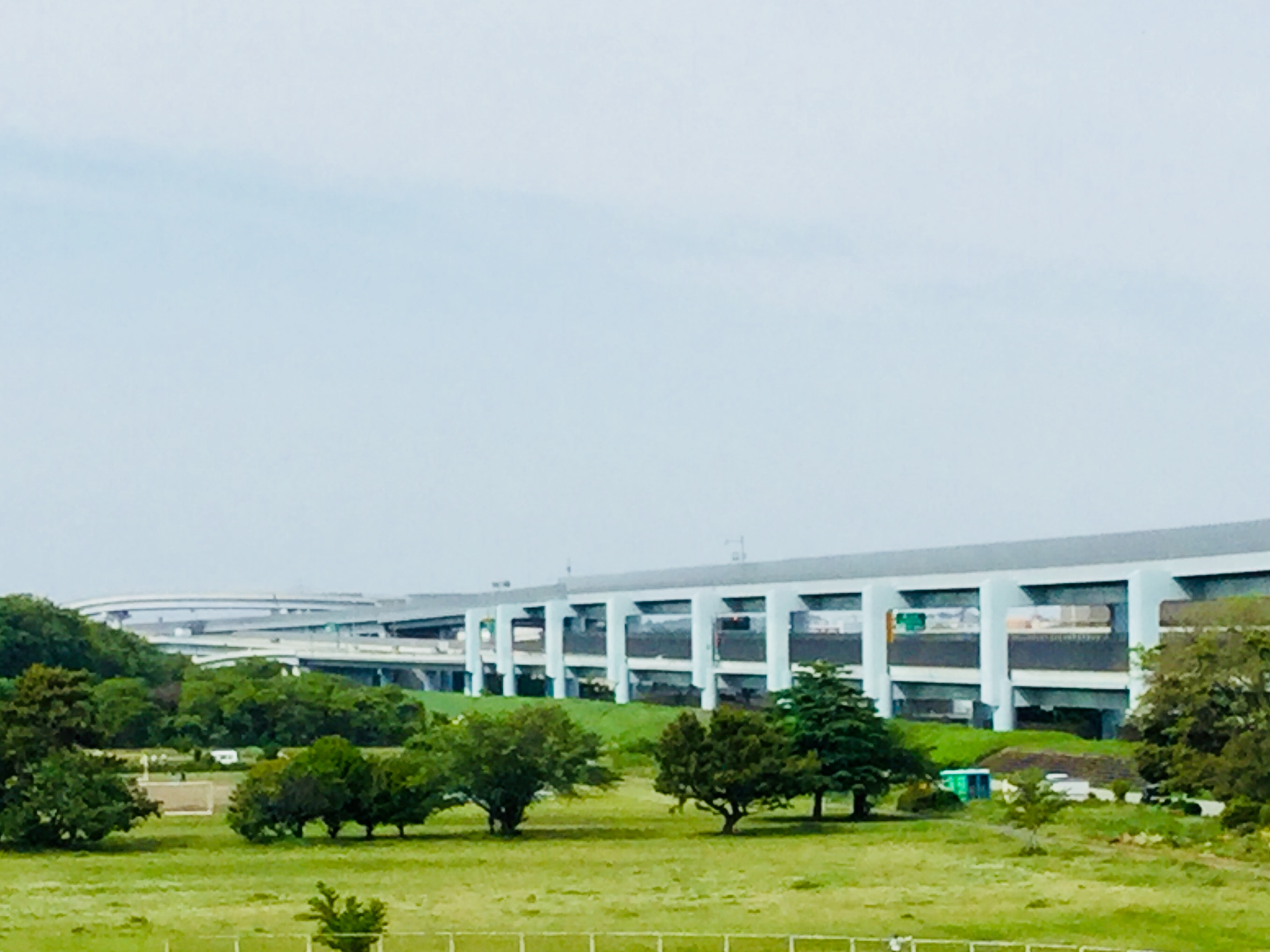 圏央道(神奈川県高座郡寒川町宮山地区)